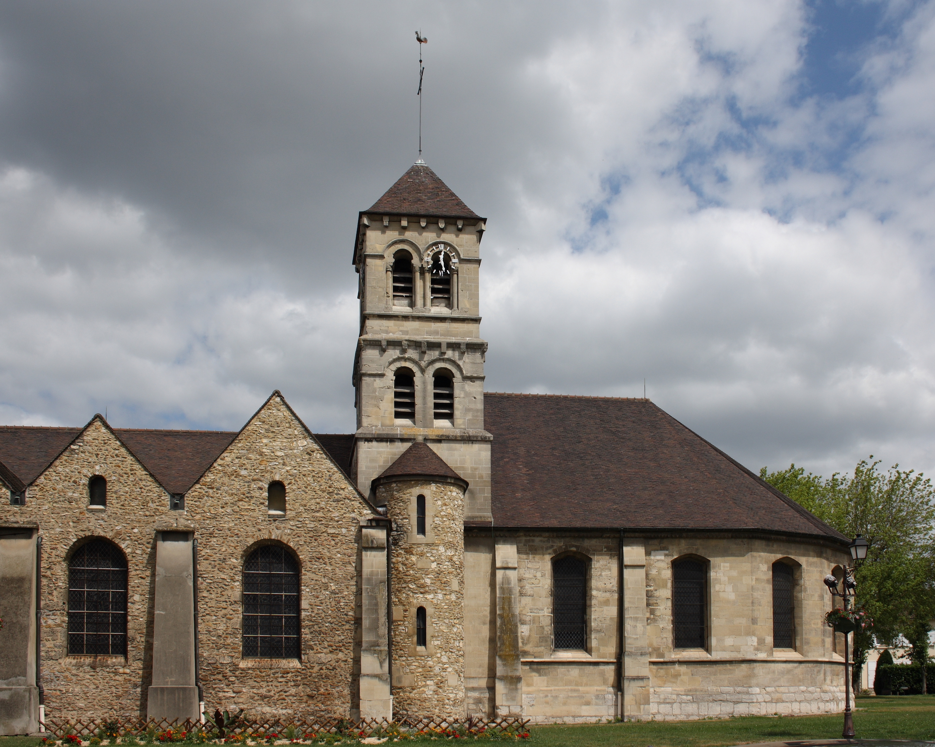 Katholische Kirche Notre-Dame in Deuil-la-Barre, einer Gemeinde im Département Val-d'Oise (Île-de-France), Ansicht von Süden